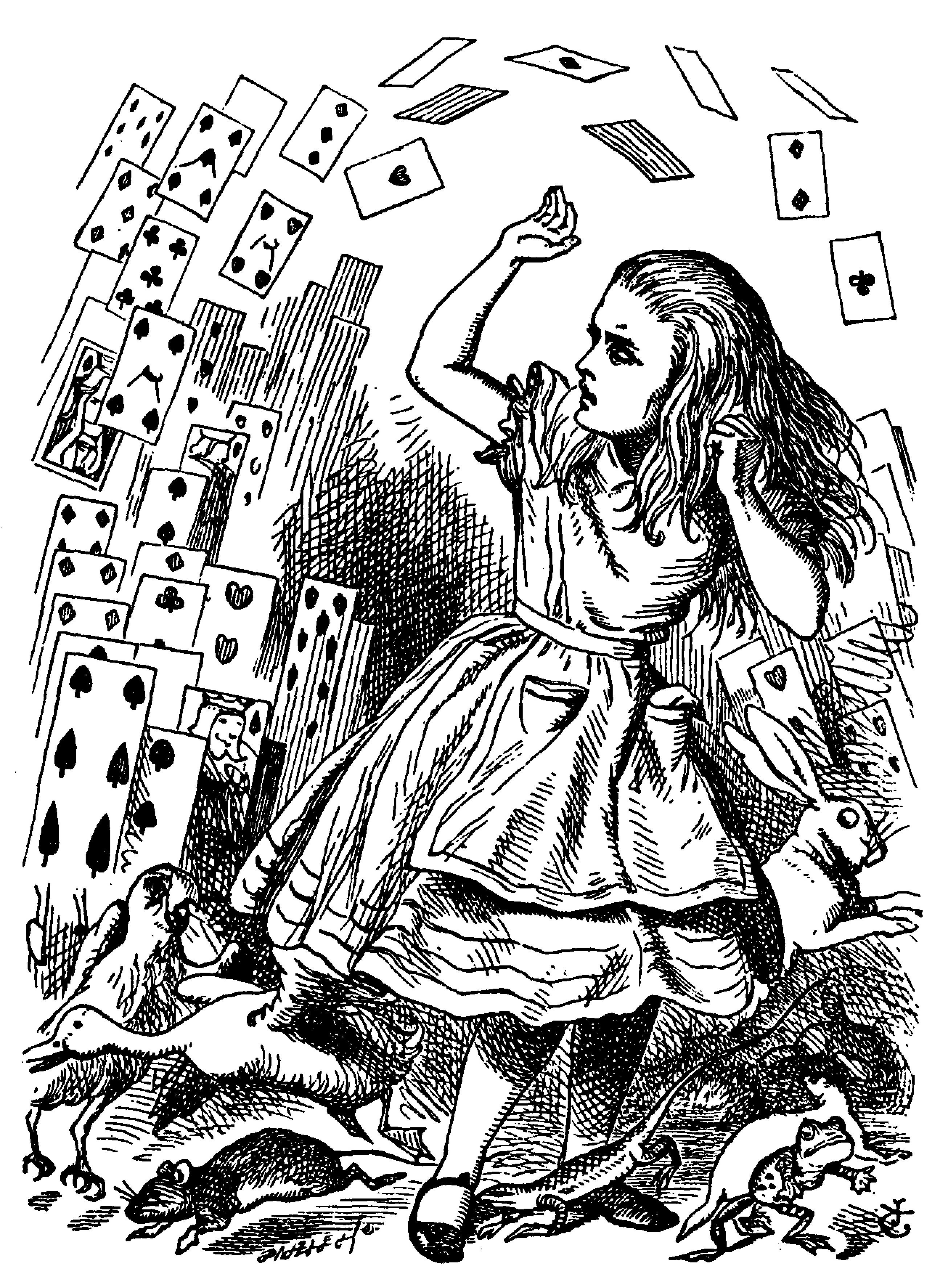 Alice’s Abenteuer im Wunderland Übersetzer: Antonie Zimmermann Orginal Titel: Alice's Adventures in Wonderland Illustrationen: John Tenniel